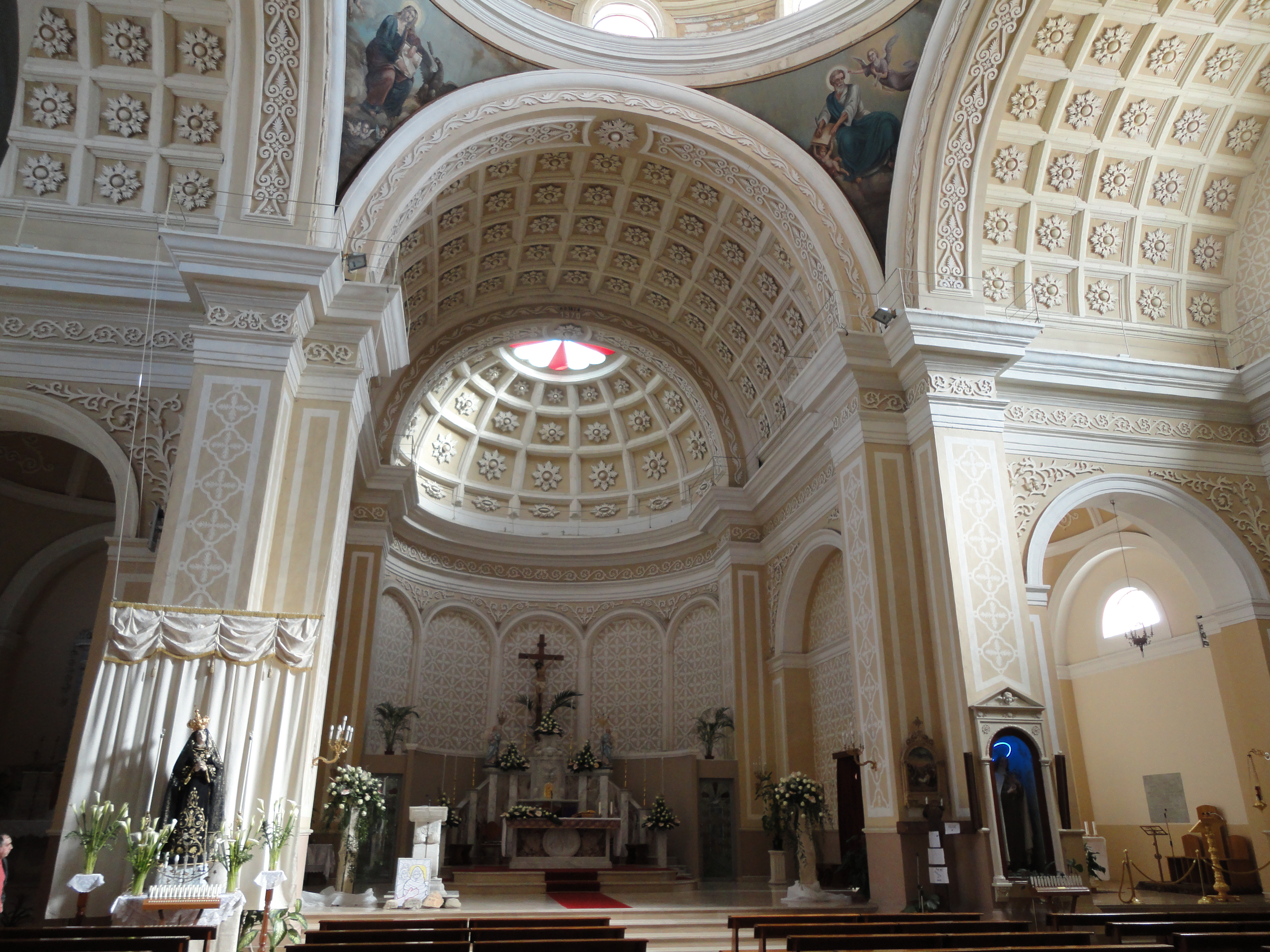 Interno chiesa dell'Addolorata Alezio, Lecce